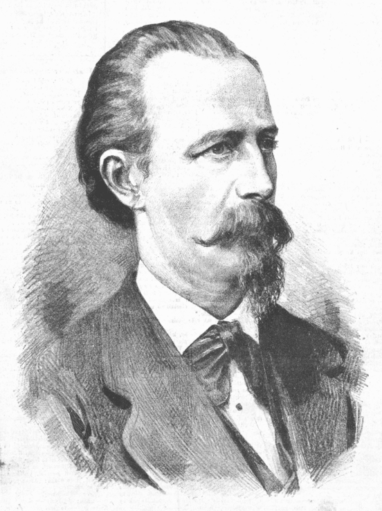 Portrét, nakreslený Janem Vilímkem pro Humoristické listy